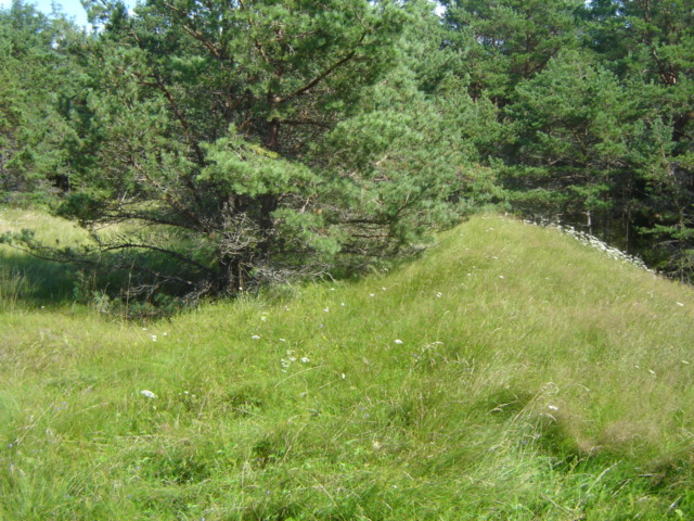 Paatsa maalinna vall